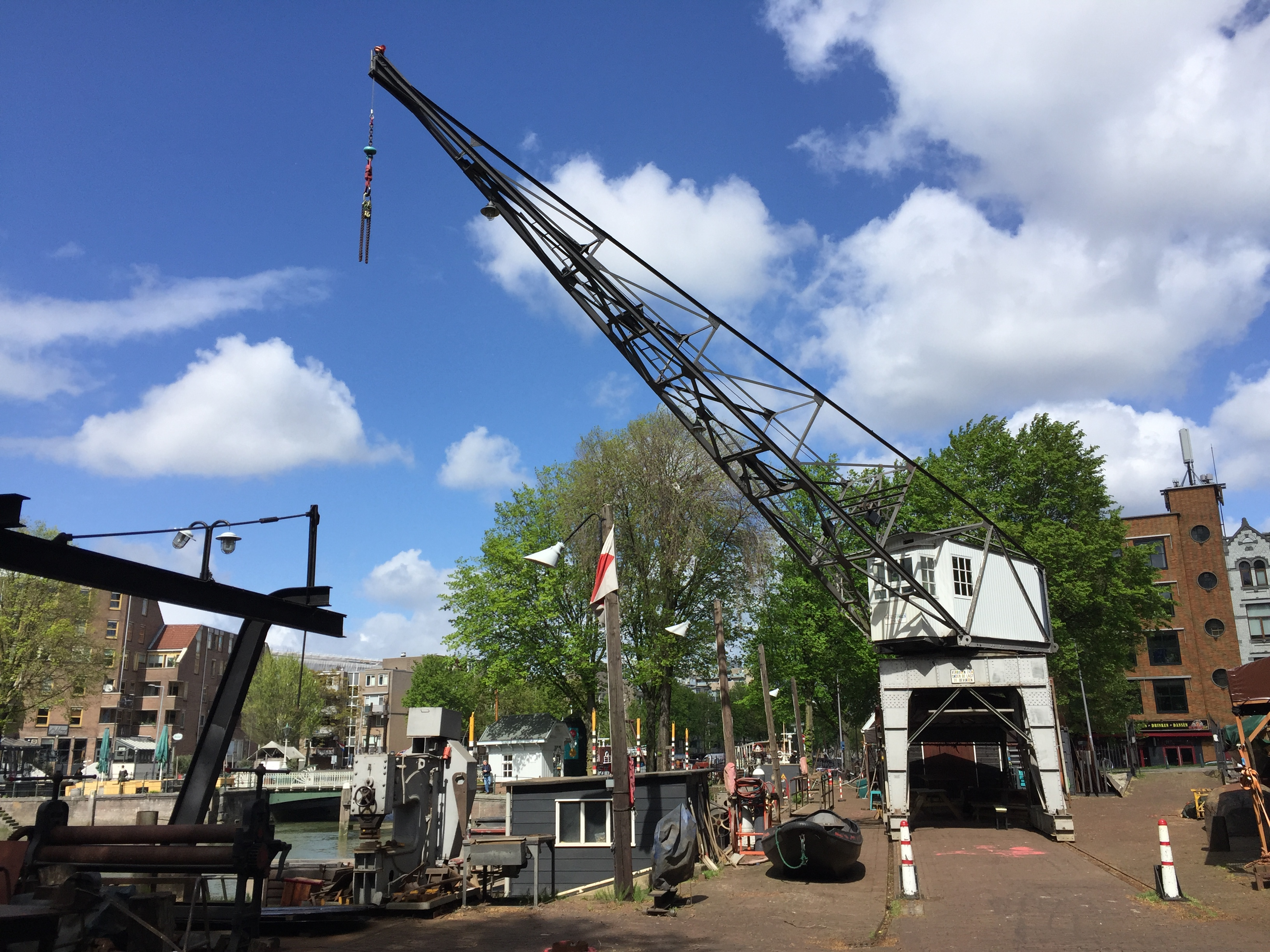 Scheepshelling Koningspoort Rotterdam, 4 mei 2019